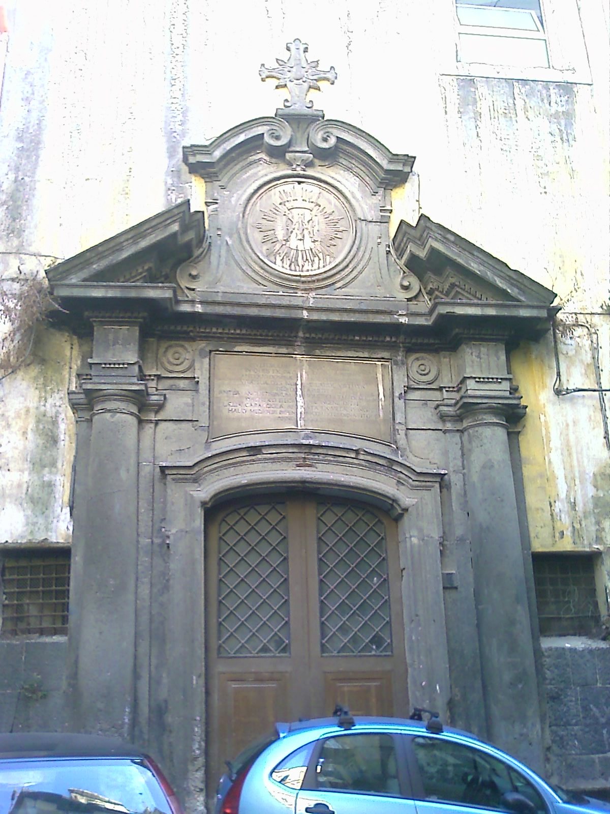 portale in Vico Donnaromita